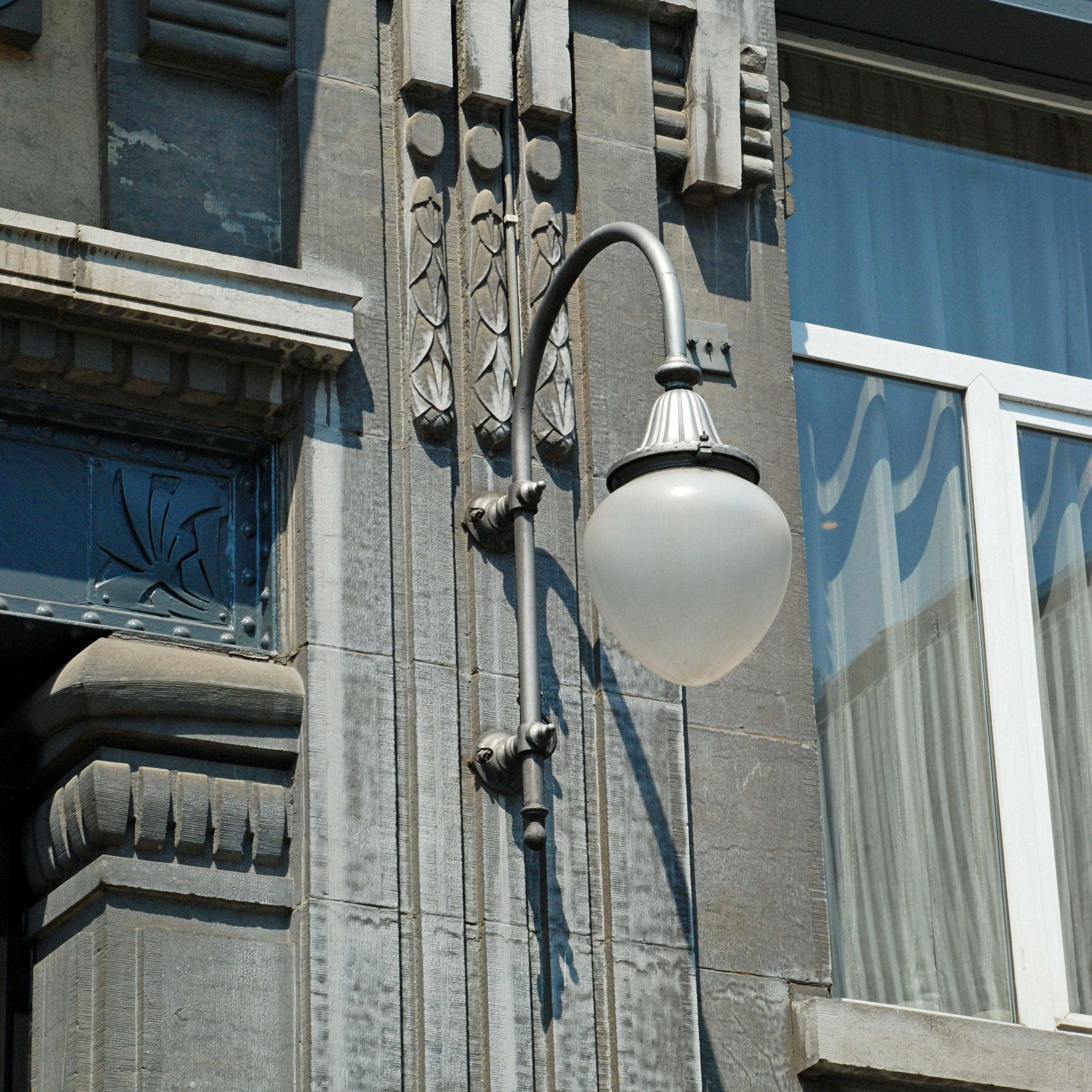 Belgique - Bruxelles - Palace Hôtel (Art nouveau, Adhémar Lener / Antoine Pompe, 1909 ; actuellement Crowne Plaza Hotel)